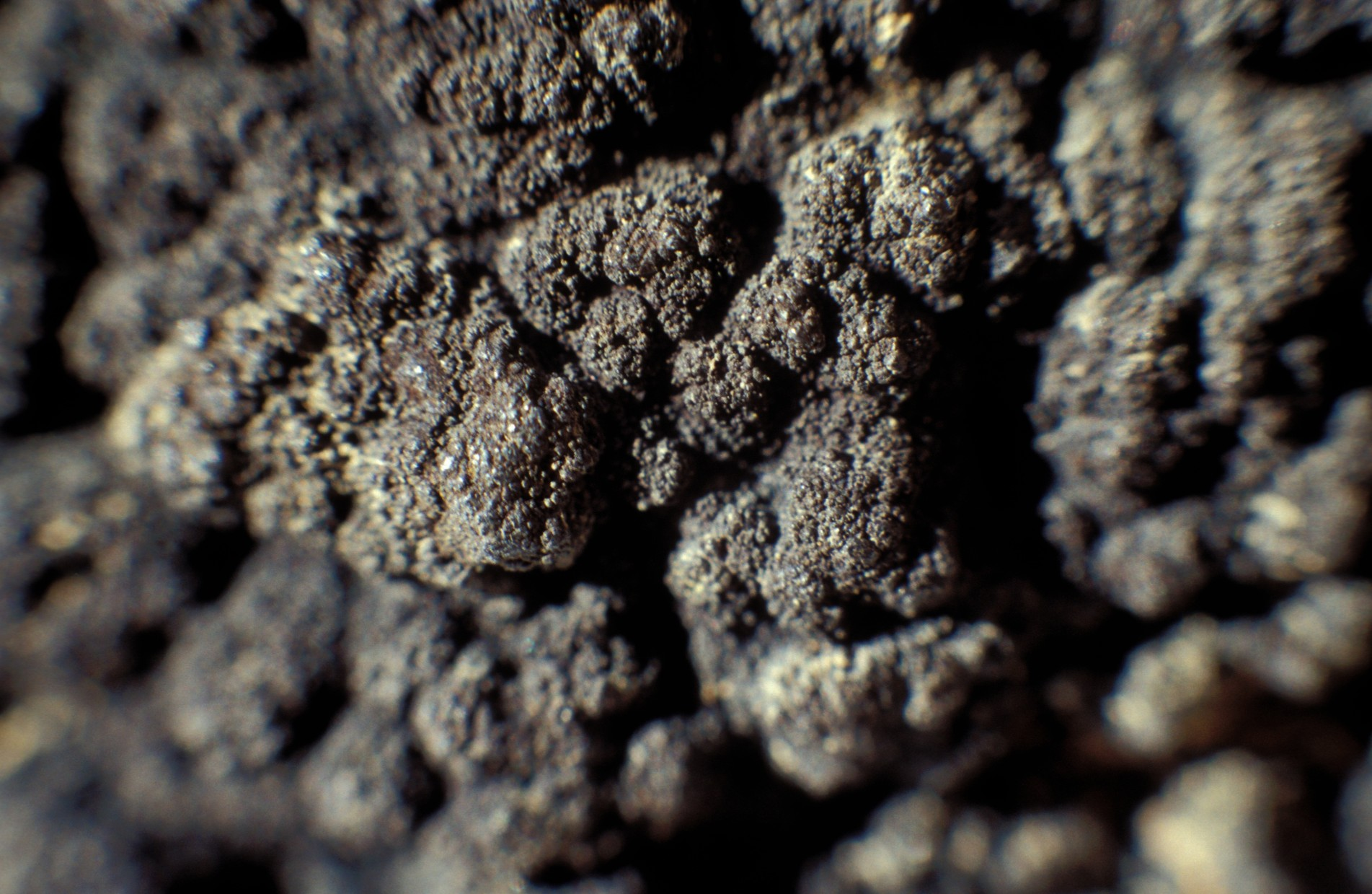 Manganknolle von 1982, "Nahaufnahme", Bildbreite: 3 cm